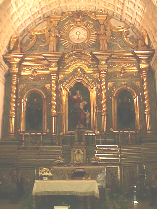 Altare maggiore della chiesa di Sant'Agostino (XVI secolo) a Cagliari